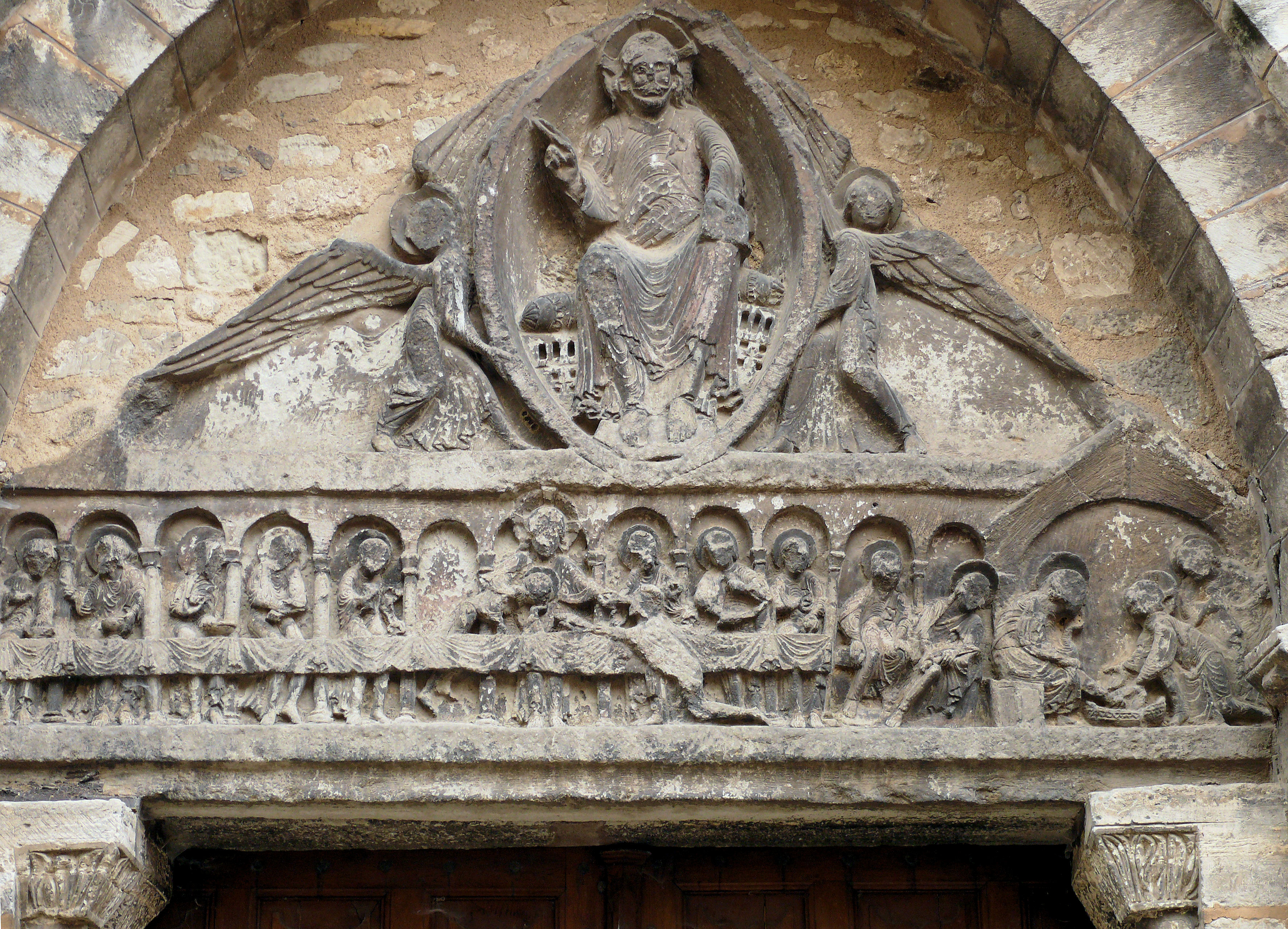 Bellenaves - Église Saint-Martin - Façade occidentale - Portail - Tympan